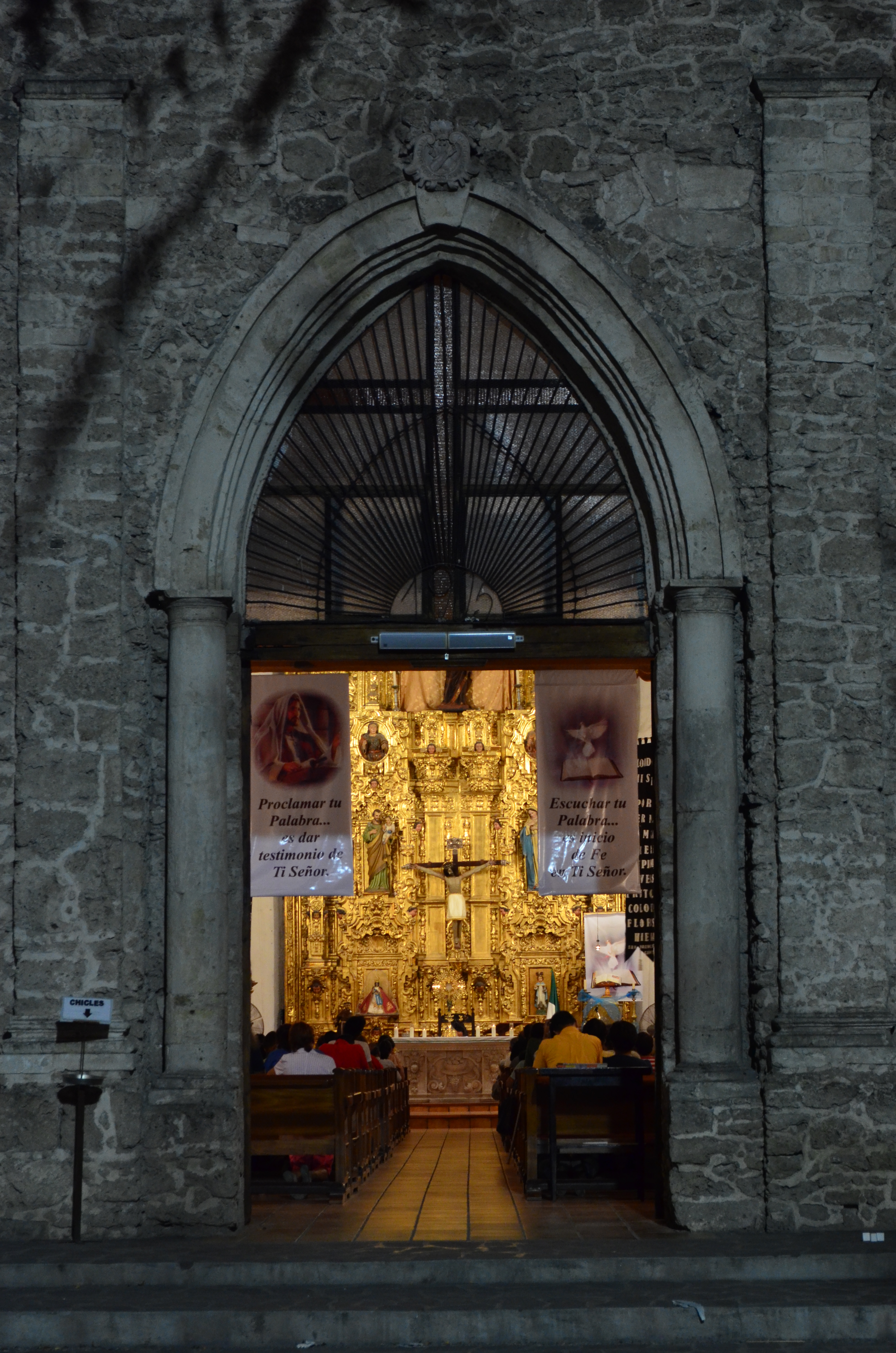 Templo de San Francisco (Monclova)